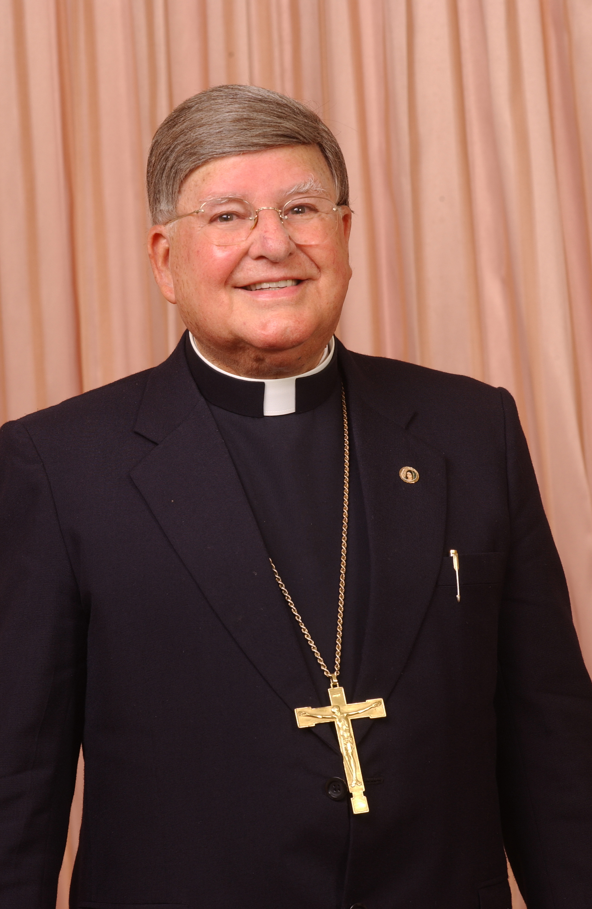 Monseñor Román Arrieta Villalobos